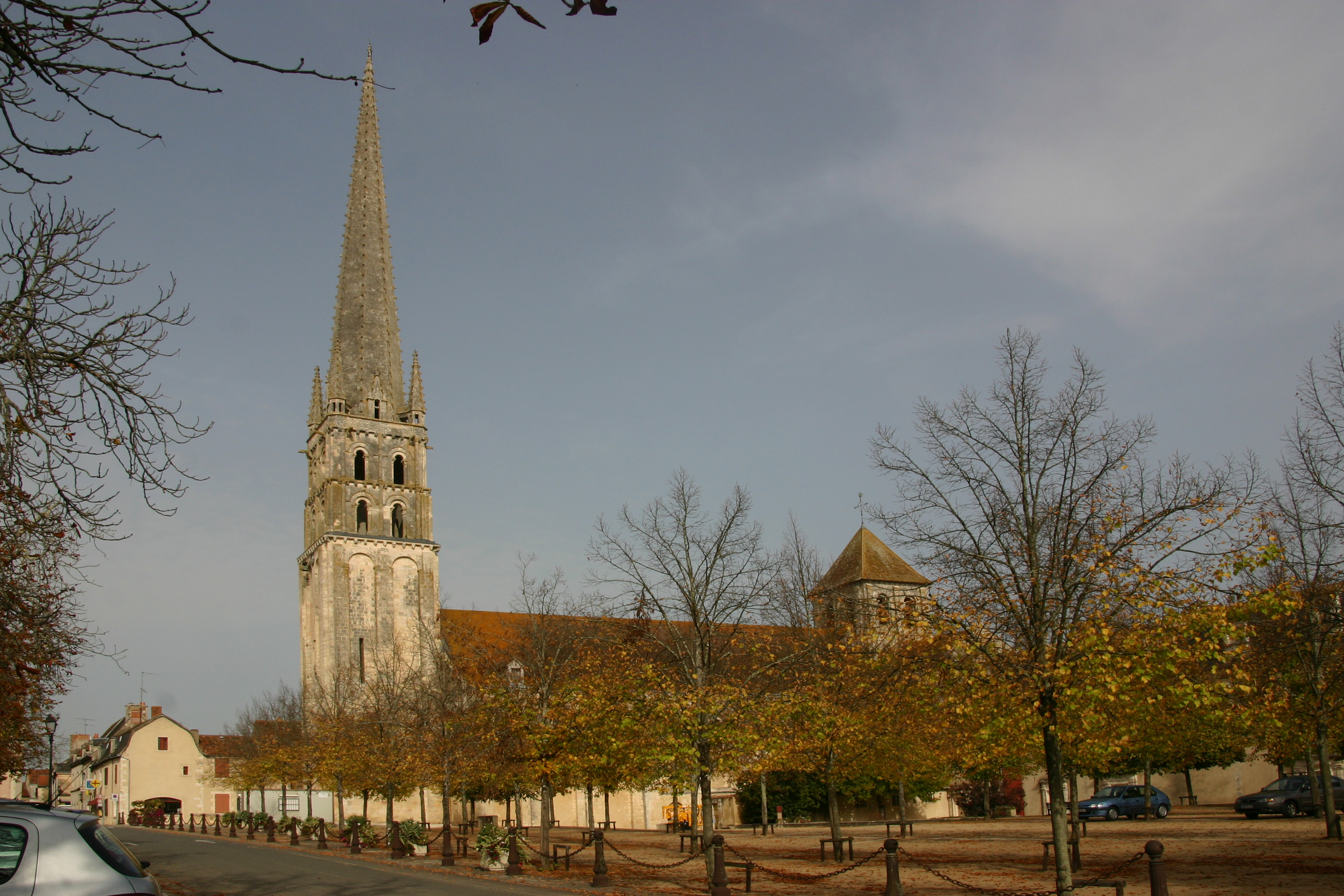 Abtei-Kirche Saint-Savin-sur-Gartempe